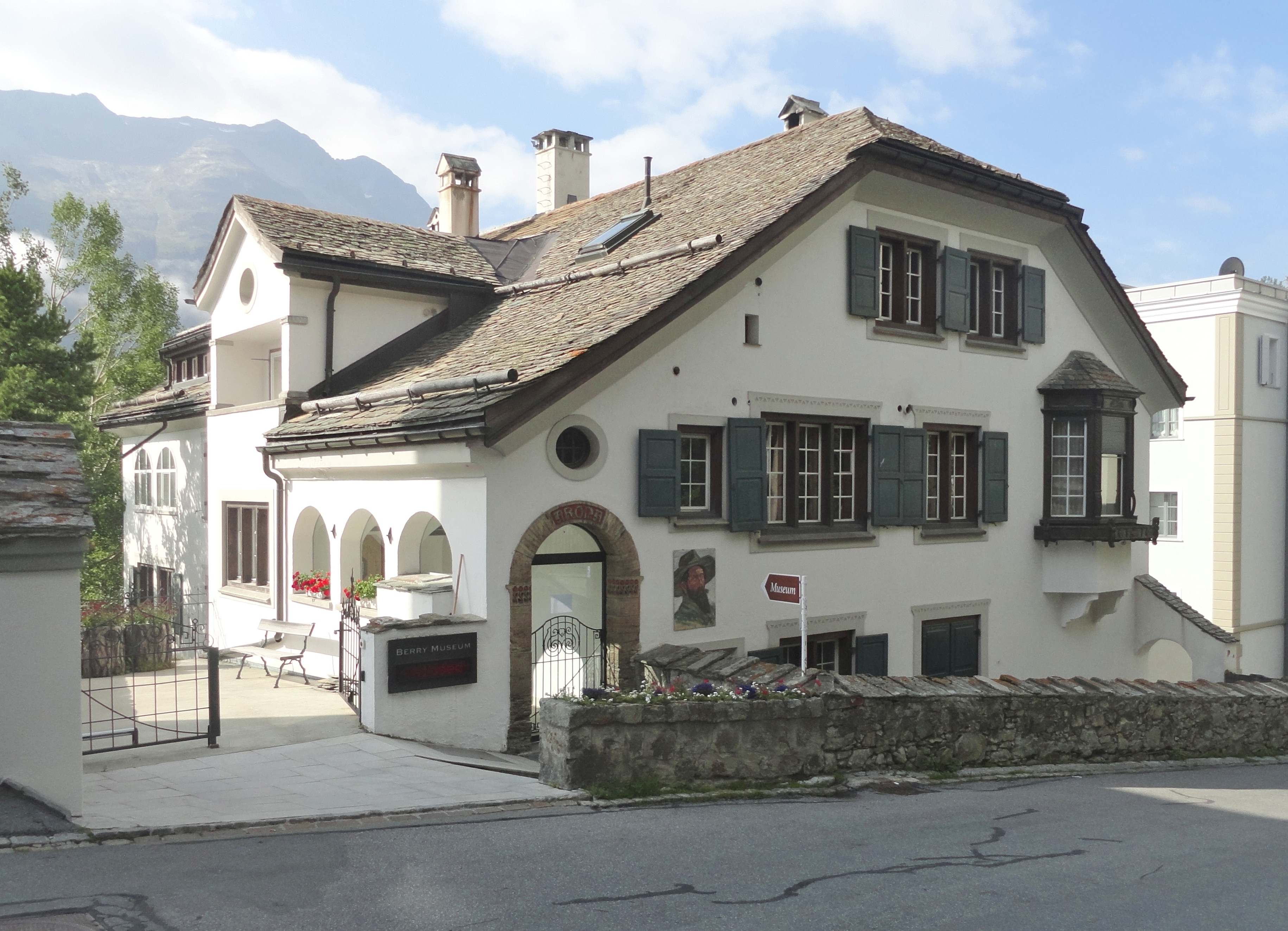 Peter Robert Berry-Museum, St. Moritz